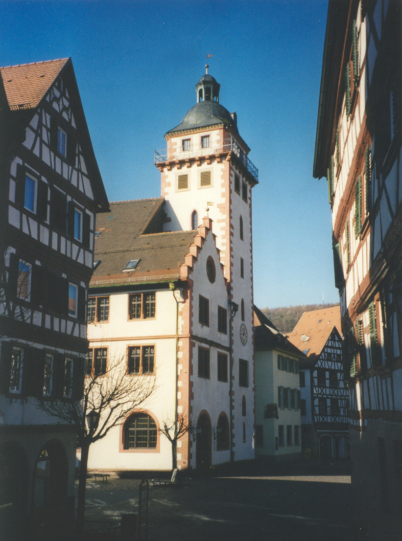 Mosbach : Rathaus. Das Rathaus entstand durch Umnutzung einer Kirche (deshalb auch der für ein Rathaus ungewöhnliche Turm). Im Baustil zwischen Gotik und Renaissance schwankend, mit Fenster-Rosette (Giebel Marktplatz-Fassade), sowie Turm mit effektvoller Spitze auf ausladender Galerie. Das Mosbacher Beispiel zählt, zumeist in der mittelalterlichen Kategorie, zu den schönsten Rathäusern Süddeutschlands.